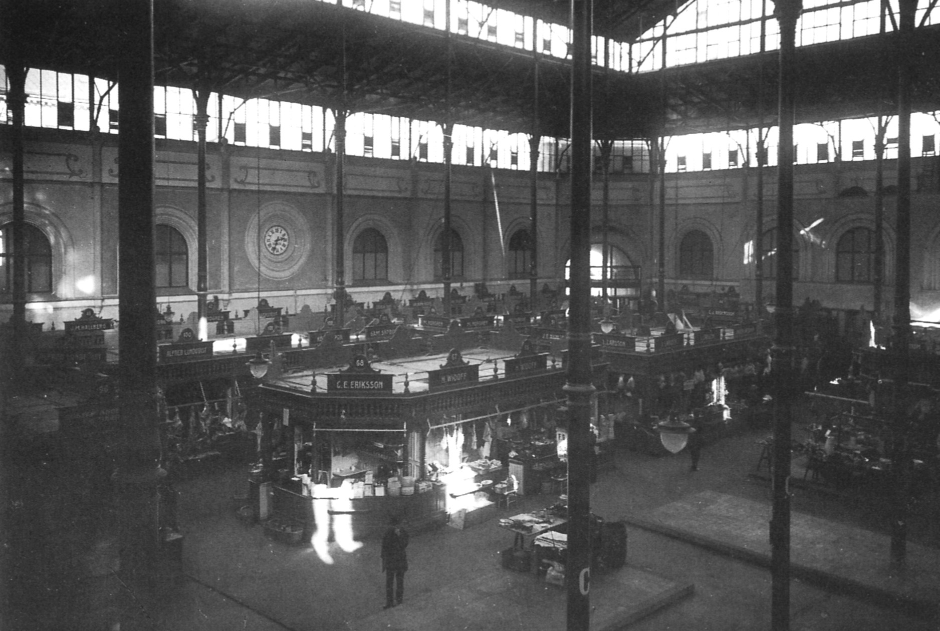 Östermalms saluhall kring 1890